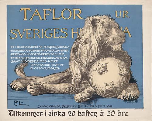 Affisch, Reklam, Bokutgivning, Carl Larsson